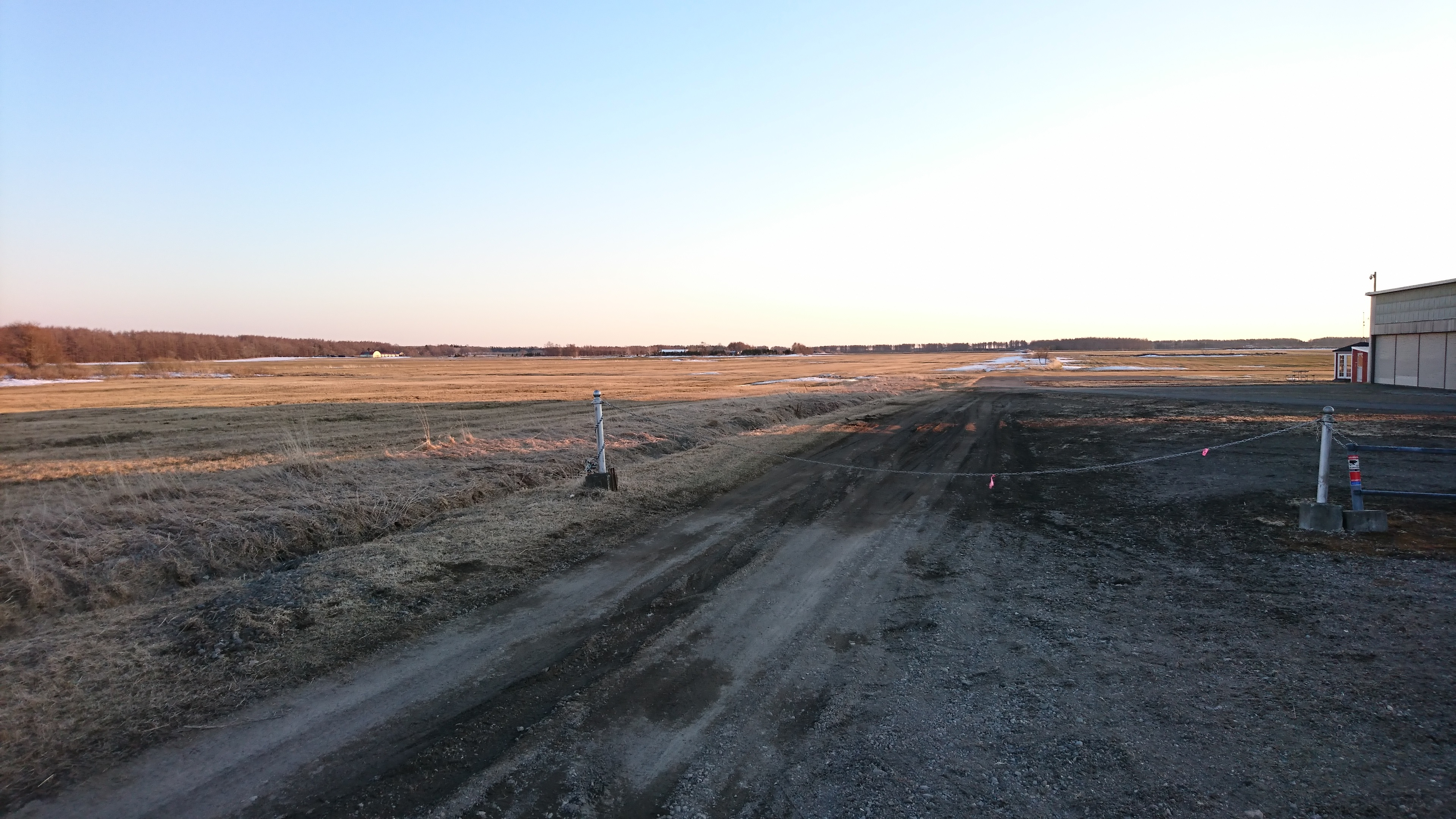 別海フライトパーク滑走路